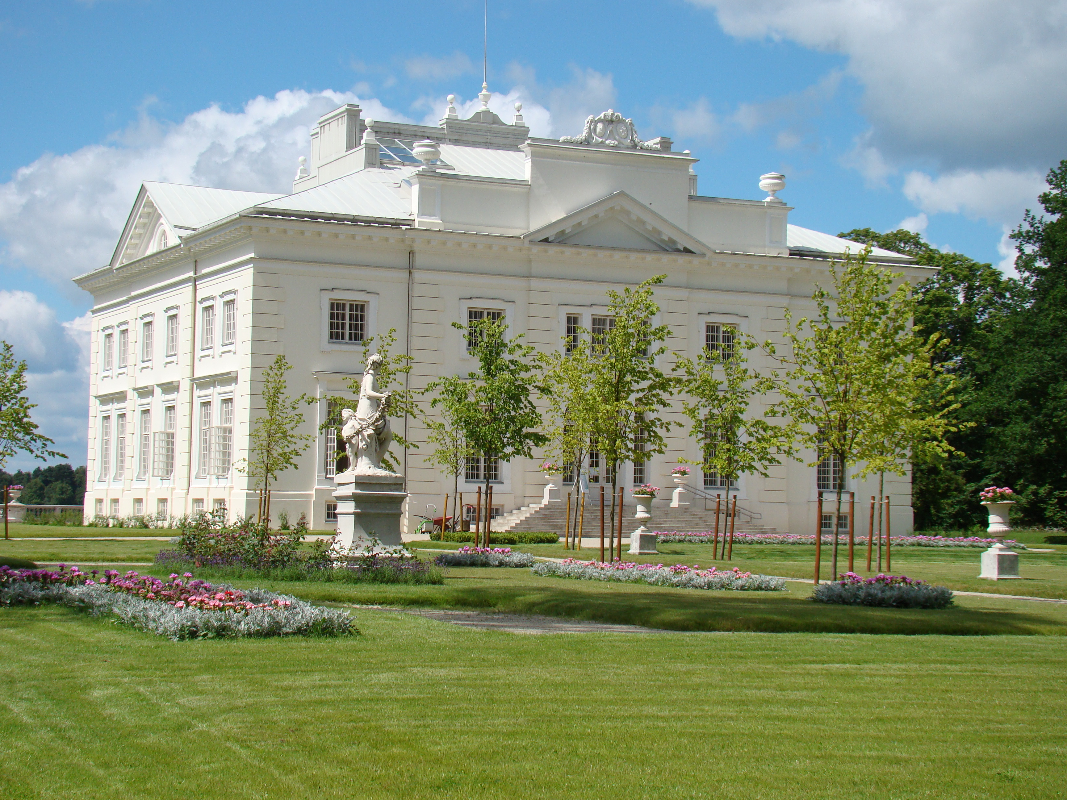 Užutrakio dvaro rūmai